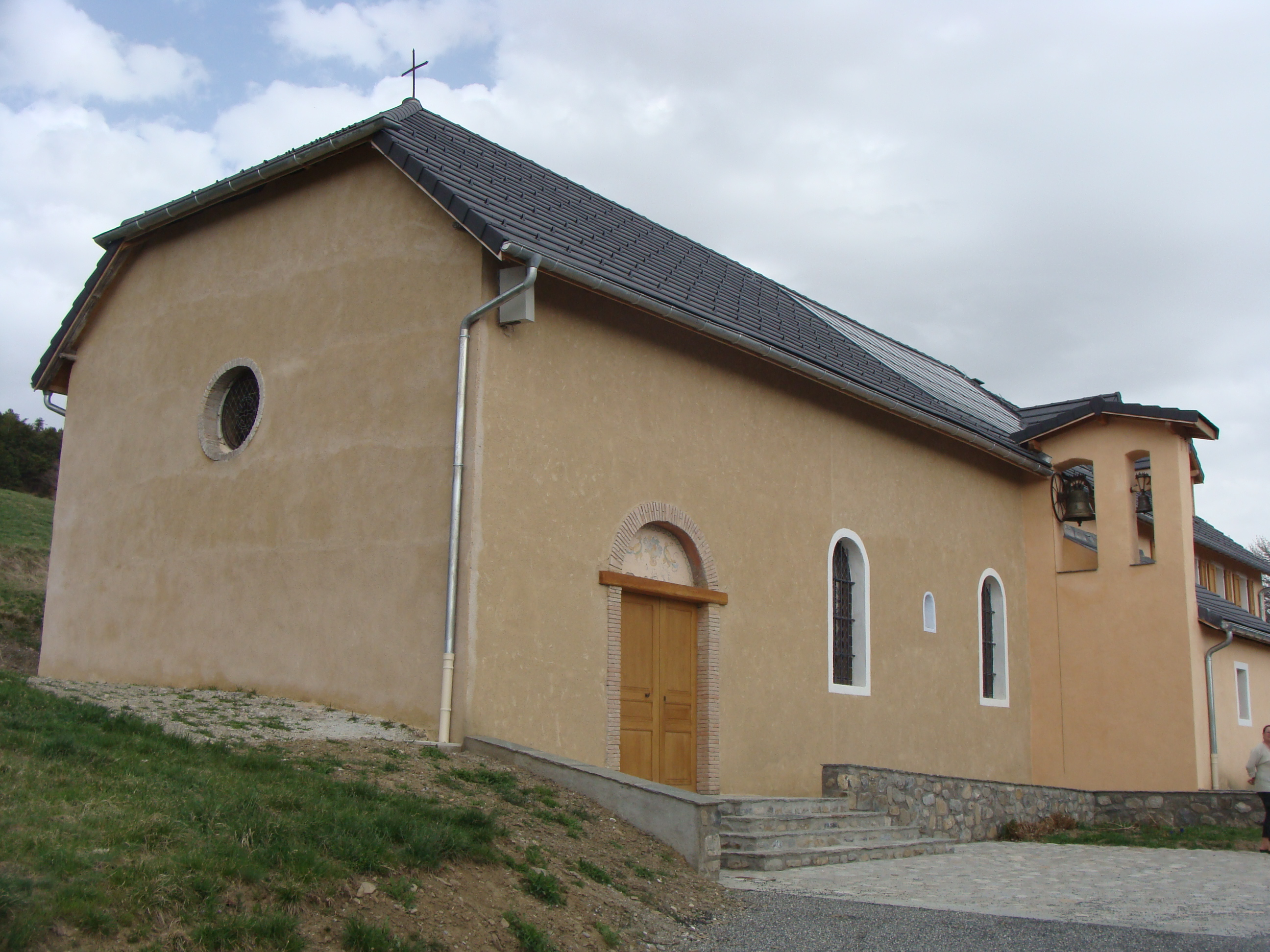 L'église paroissiale de Puy-Sanières (Hautes-Alpes), lieudit 'le château'.